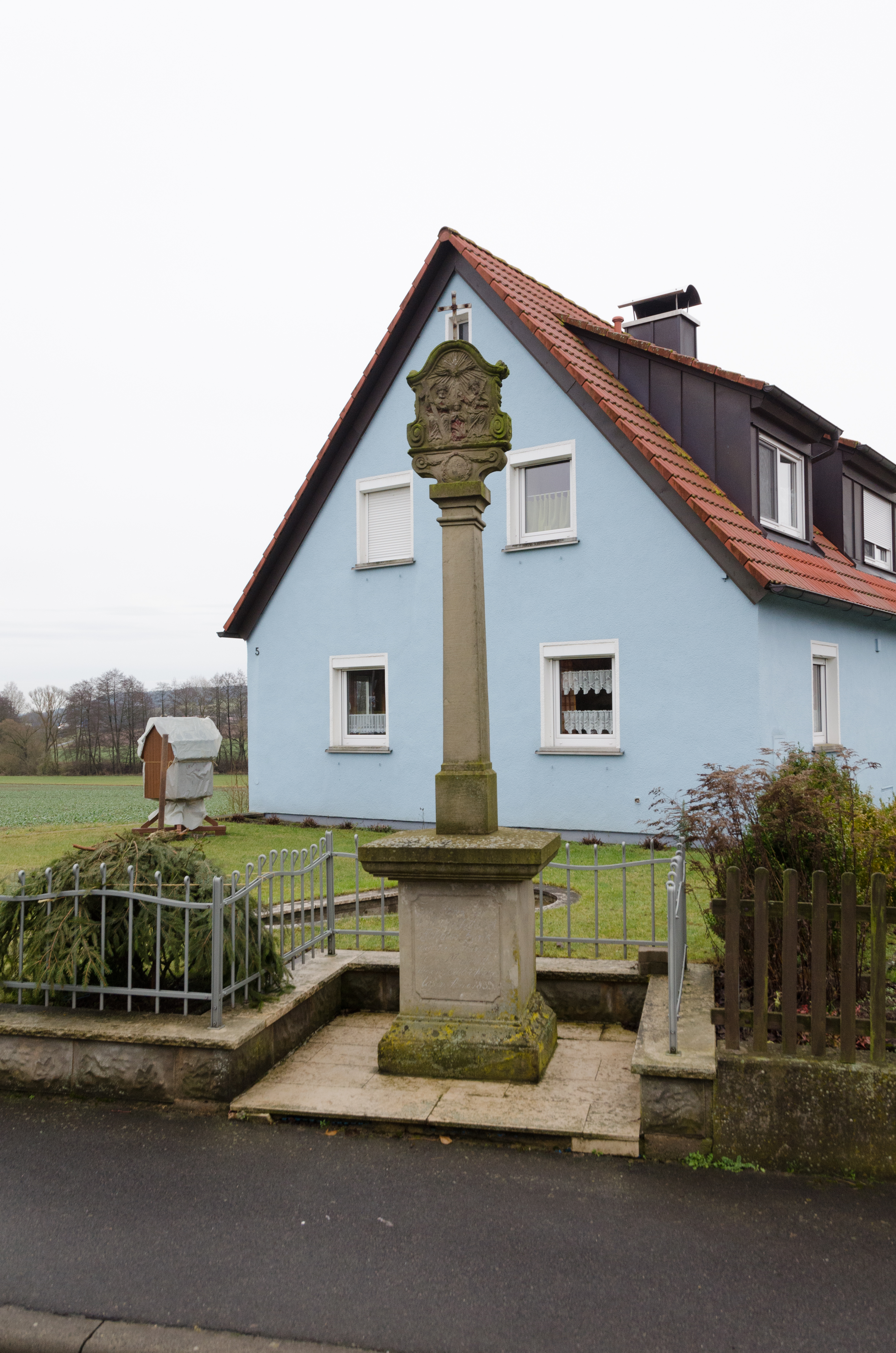 Geiselwind, Langenberg, Bildstock, D-6-75-127-59